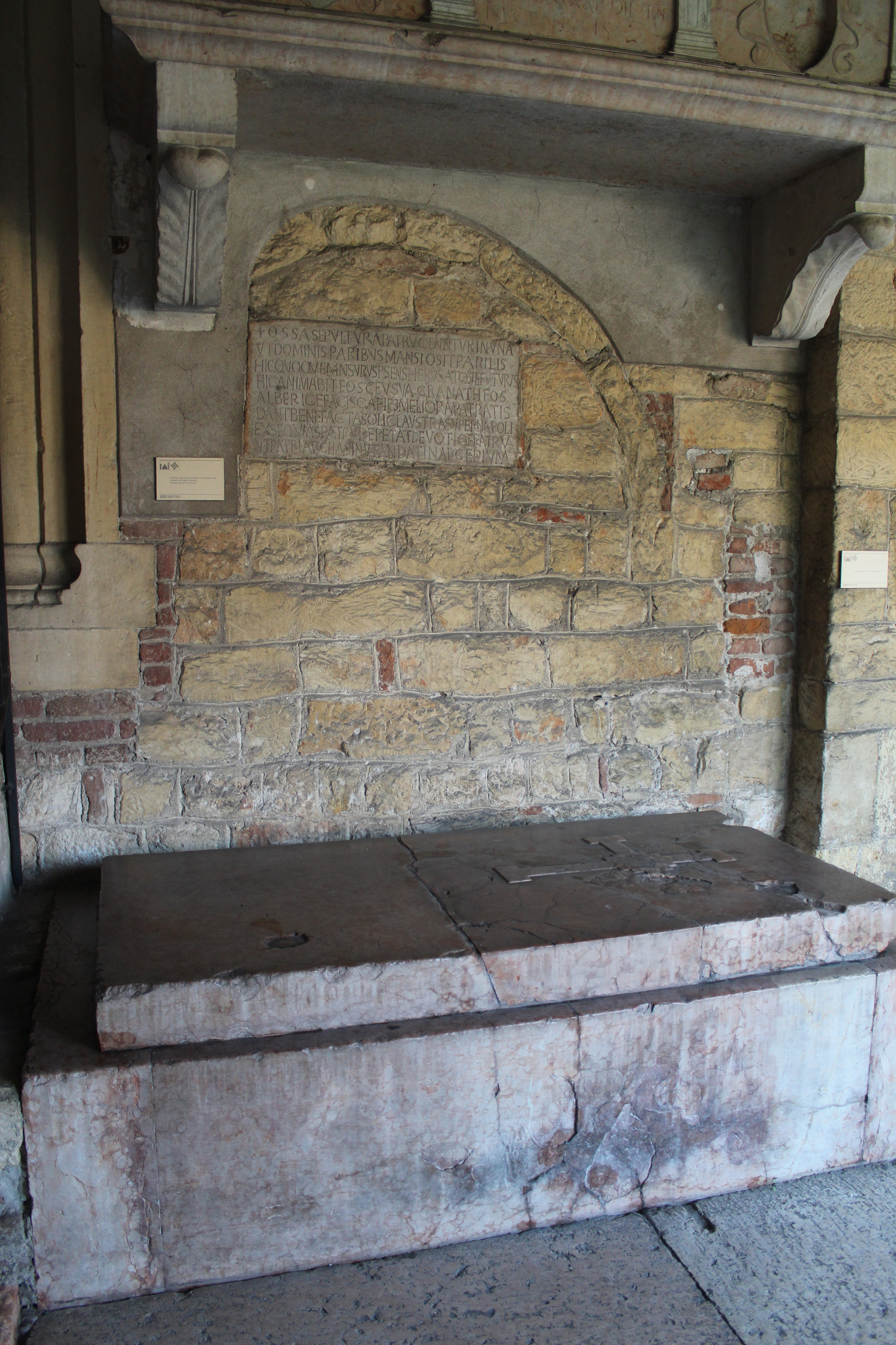 Pietra sepolcrale della tomba dei monaci nel chiostro della basilica di San Zeno a Verona